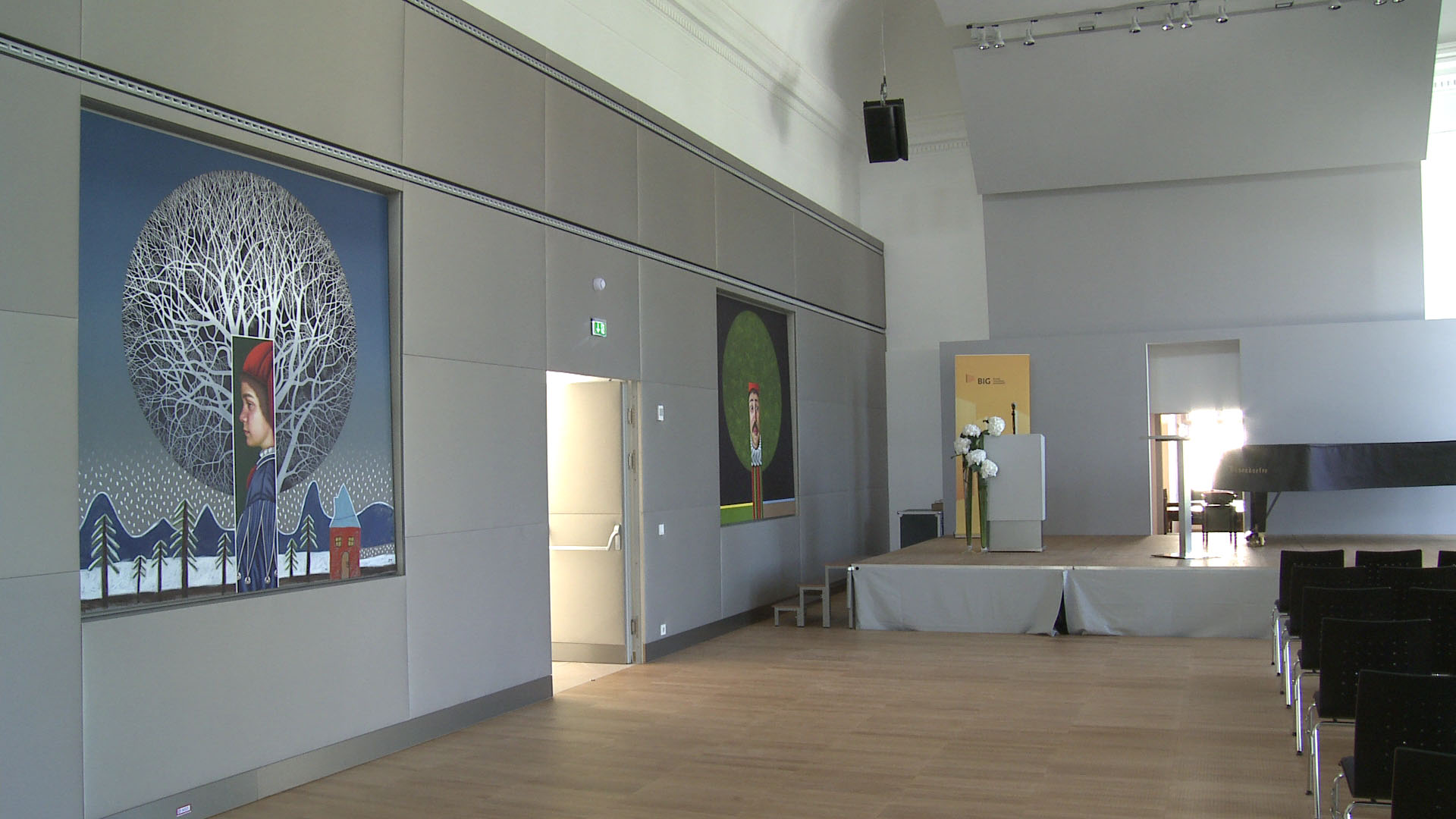 Schloss Weinzierl - Festsaal